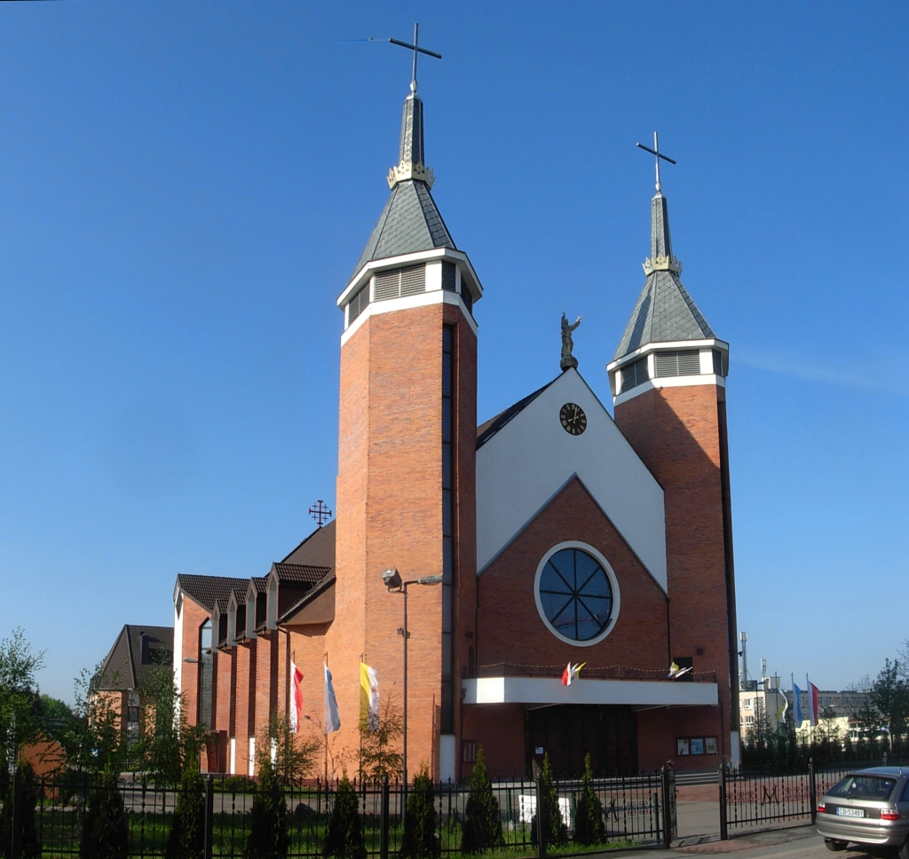 Kościół p.w. Matki Bożej Fatimskiej w Bydgoszczy na osiedlu Wyżyny